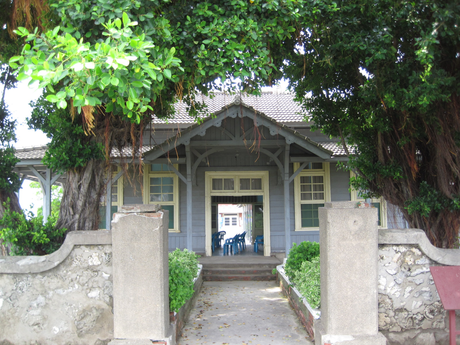 臺南市安南區安順鹽田船溜暨專賣局台南支局安平出張所